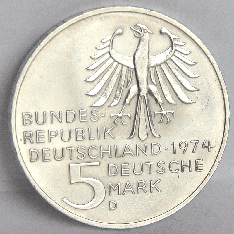 5-DM-Gedenkmünze Immanuel Kant; Revers